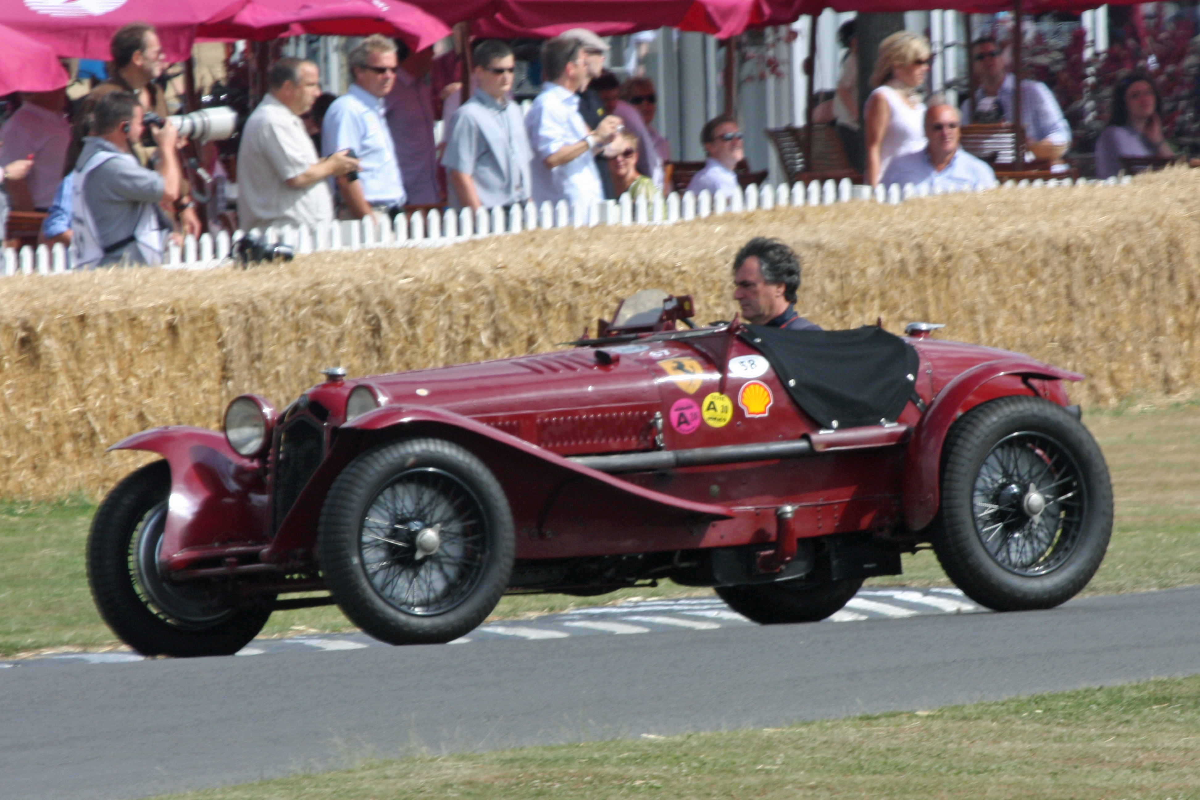 Goodwood 2009